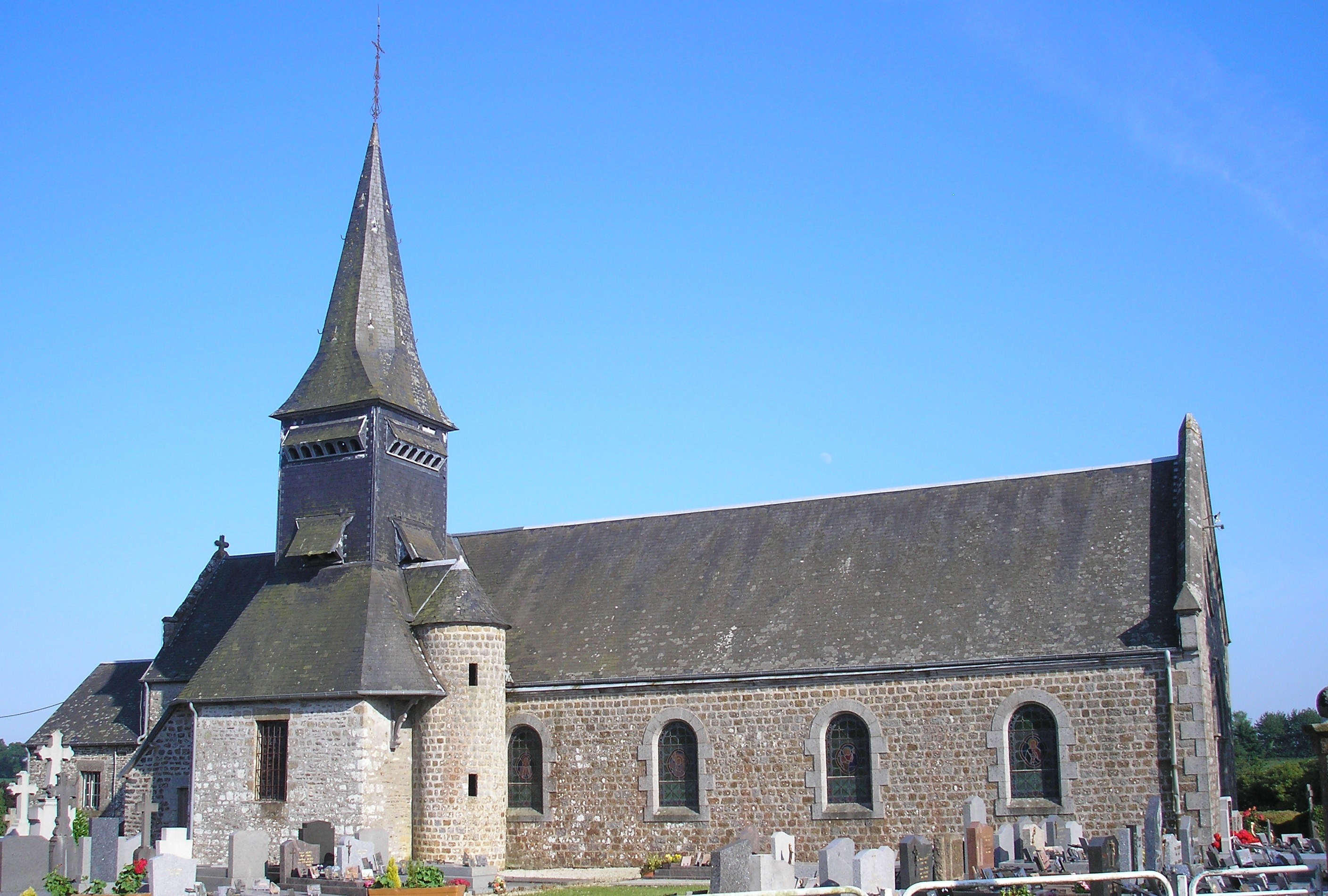 Moncy (Normandie, France). L'église Notre-Dame-de-la-Nativité.